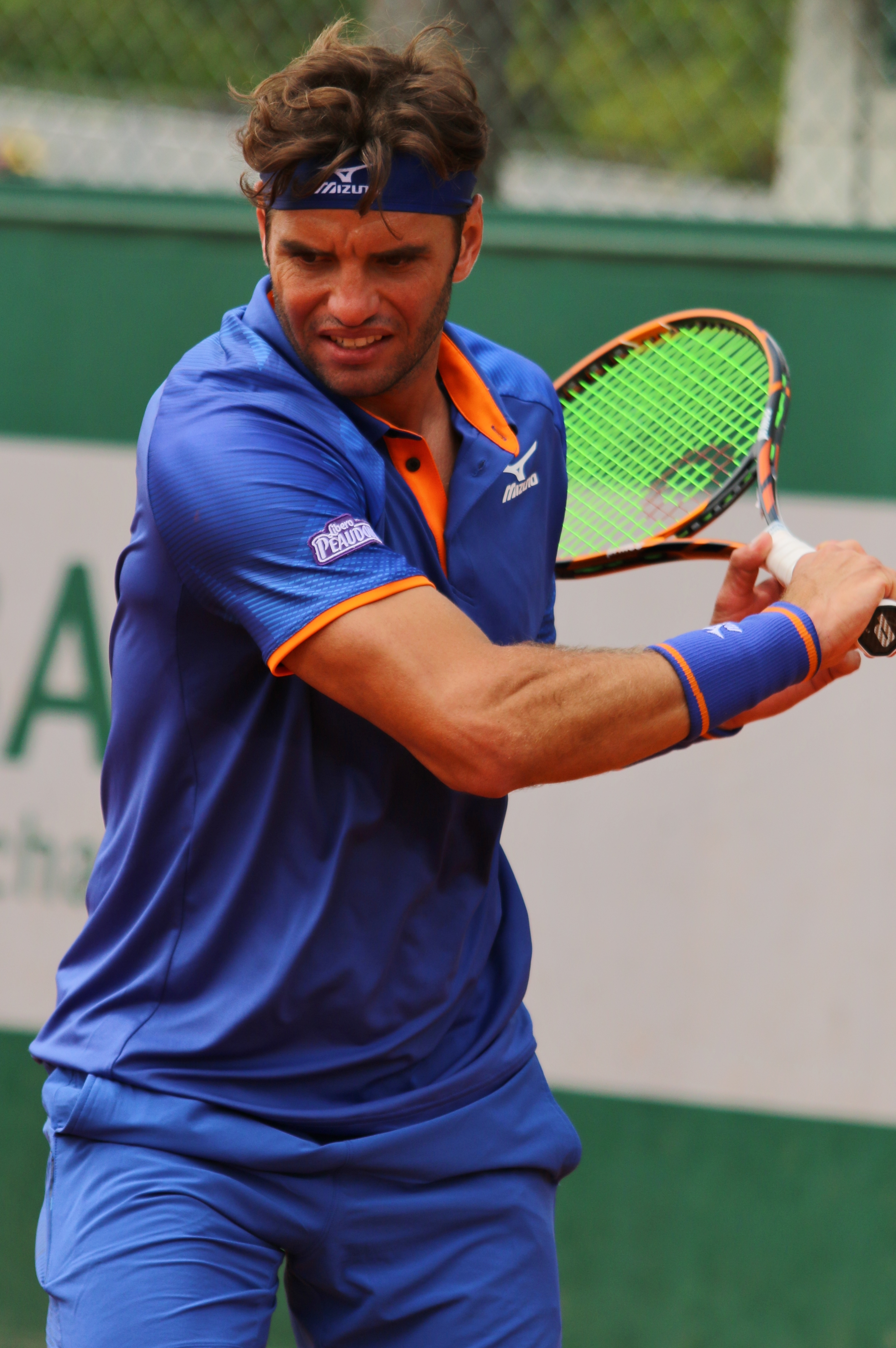 Jaziri RG19 (8)